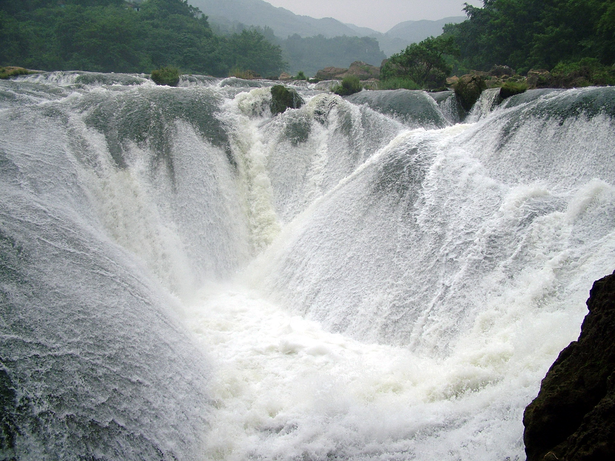 银链坠潭瀑布，位于贵州天星景区水上石林左上方。